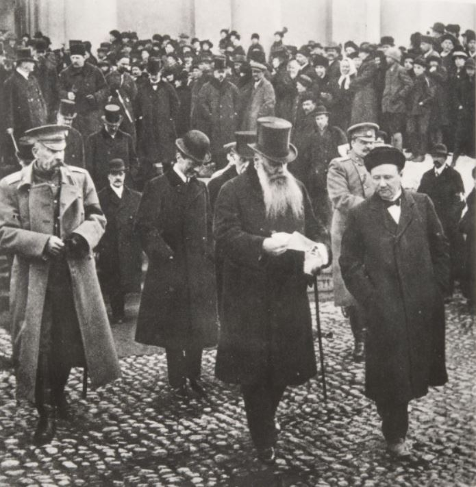 Kenraalikuvernööri Stahovitsh ja Oskari Tokoi palaamassa valtiopäivien avajaisjumalanpalveluksesta 11.4.1917